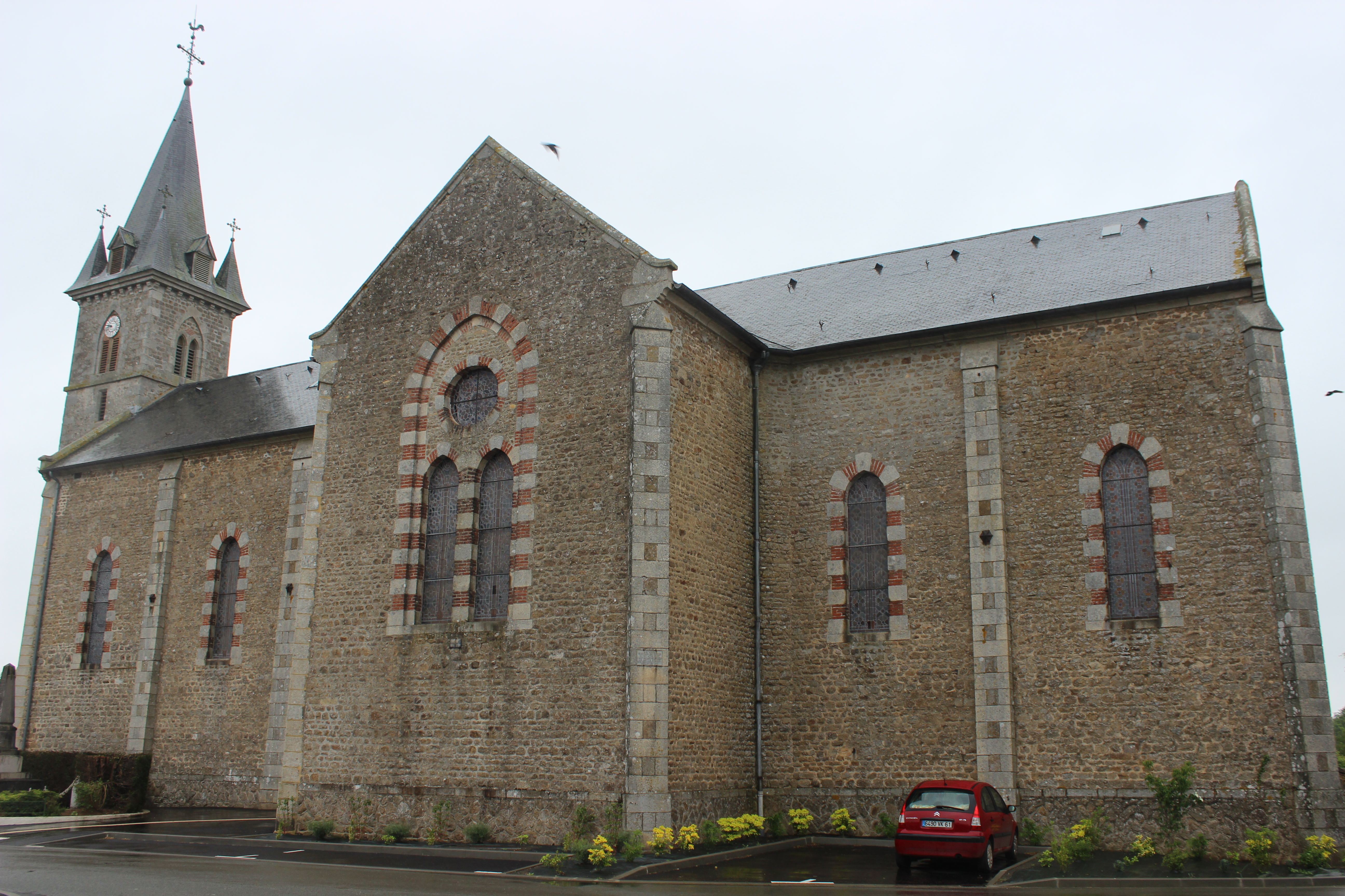 église de Ciral